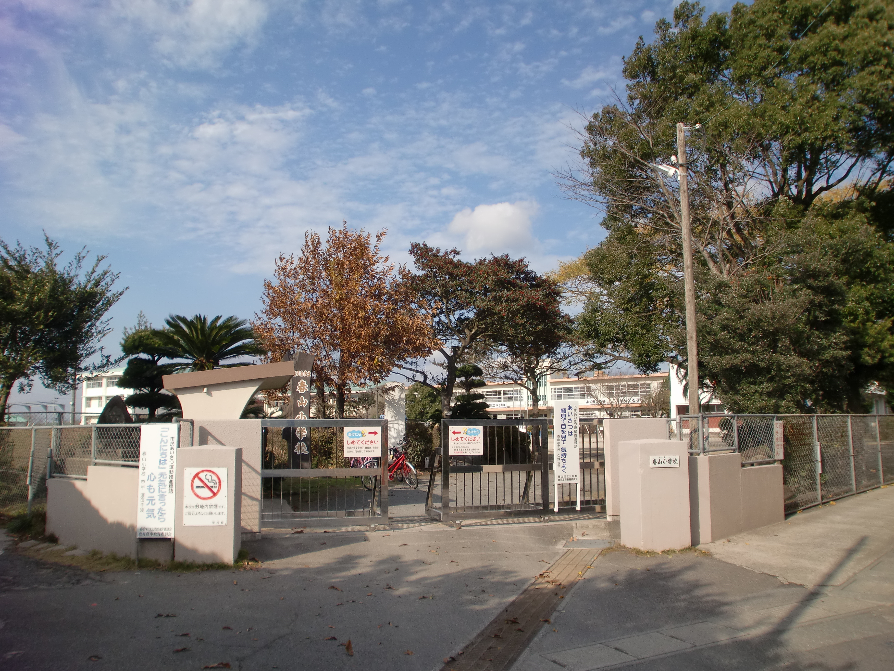 鹿児島市立春山小学校の外観。